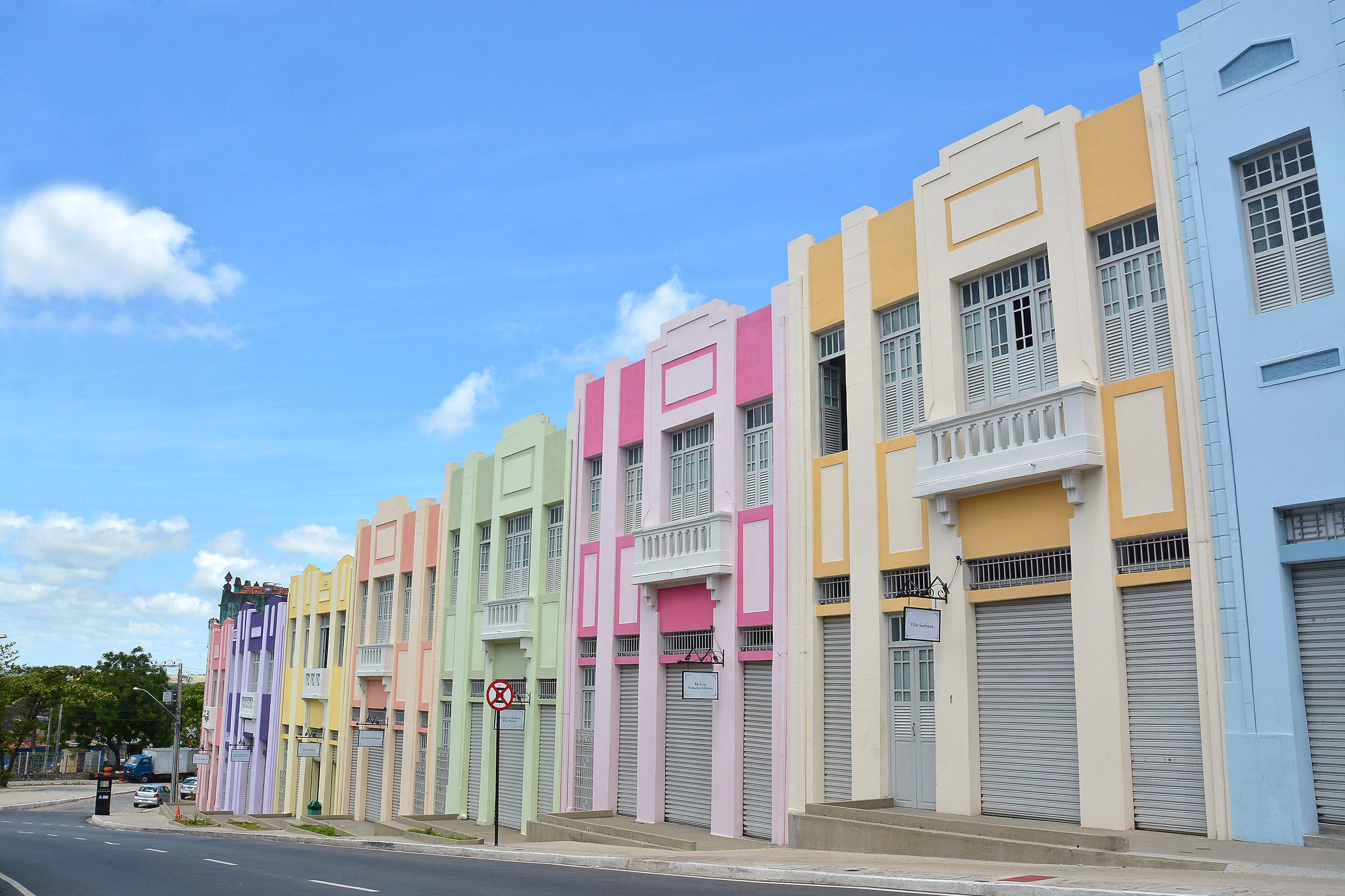 Villa sanhaua joão pessoa Paraíba